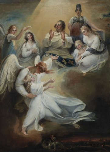 Huile sur toile - 99 x 72 cm Photo : Christie’s